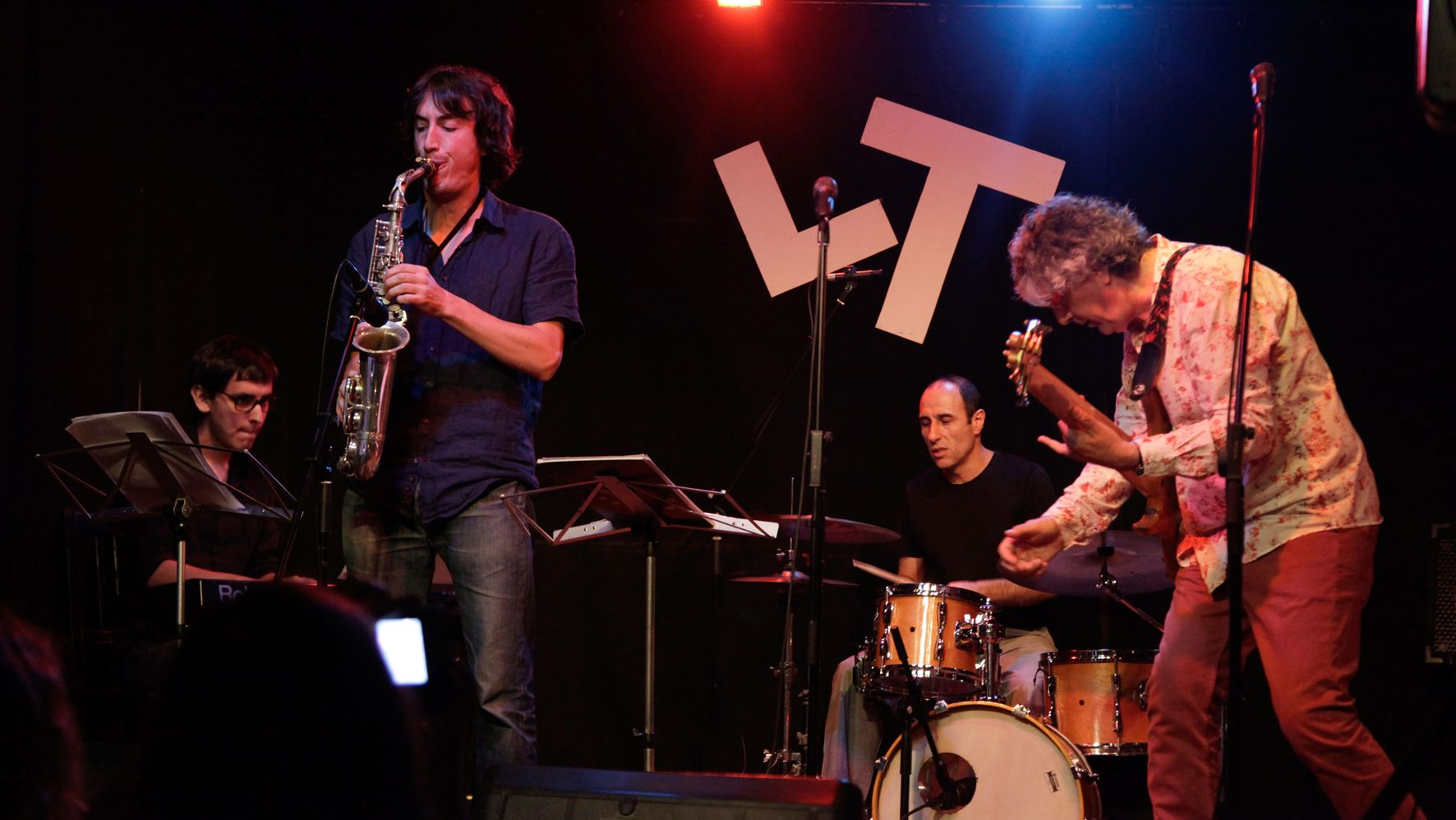 Tocando con La Película de Gregorio en Las Tablas, Madrid, 2012